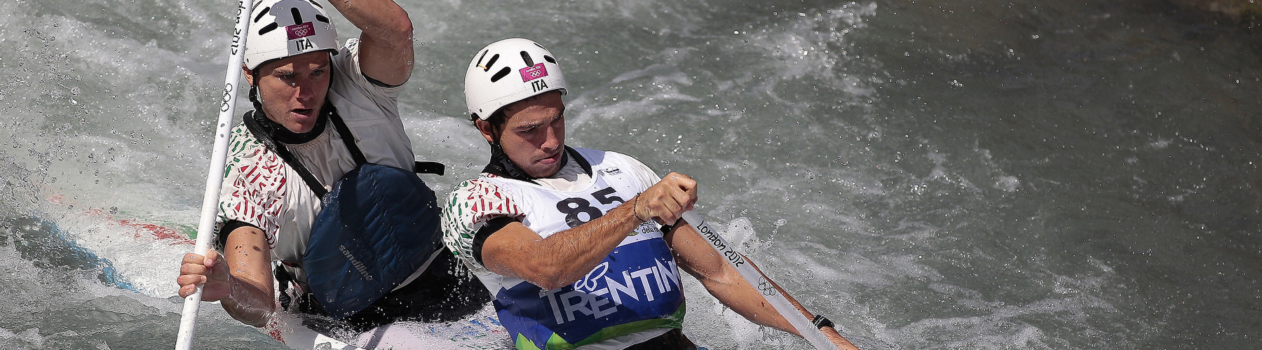 Ferrari in azione in C2 ai Campionati Italiani di Mezzana nel 2013